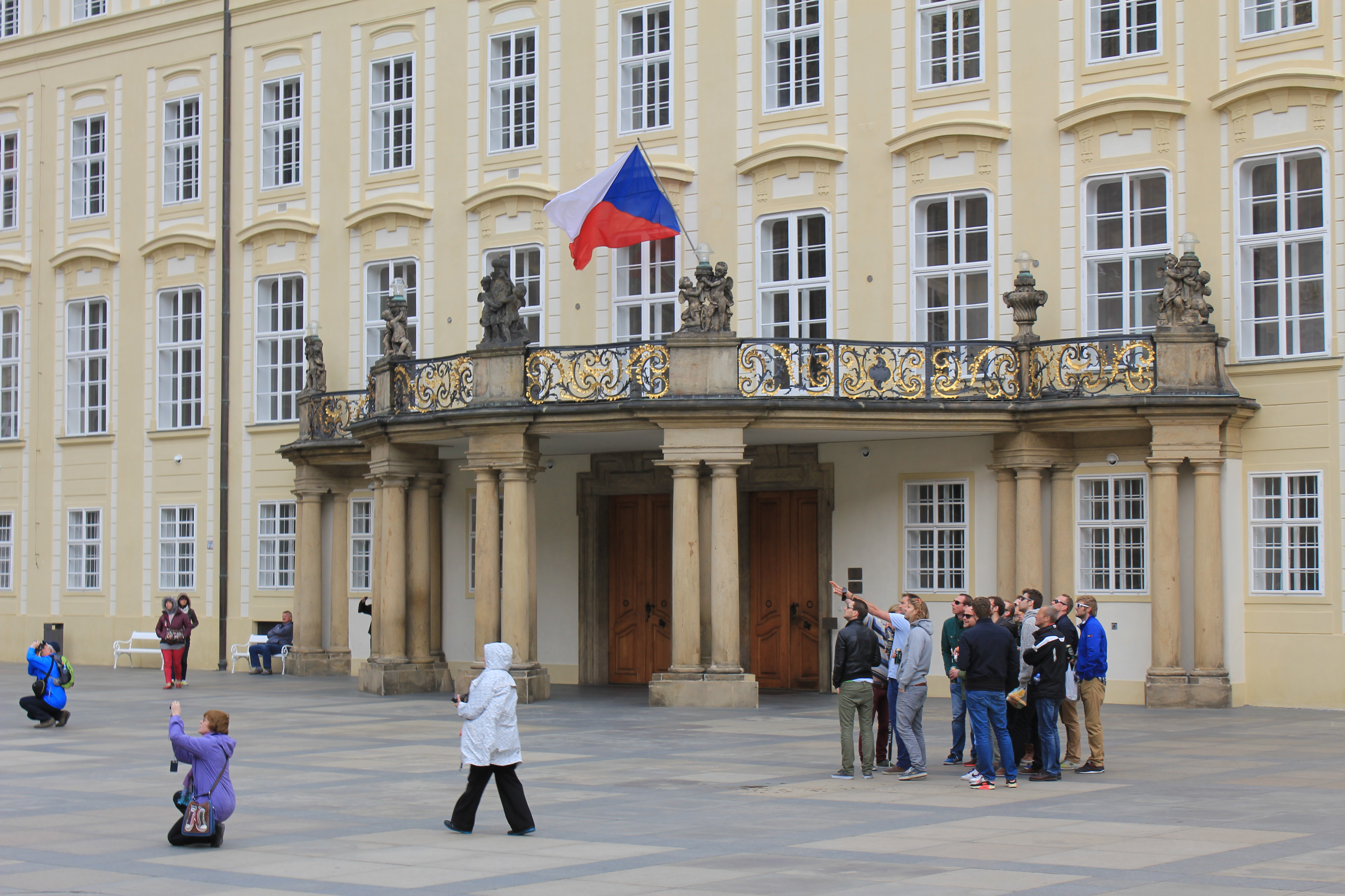 kongeplassen